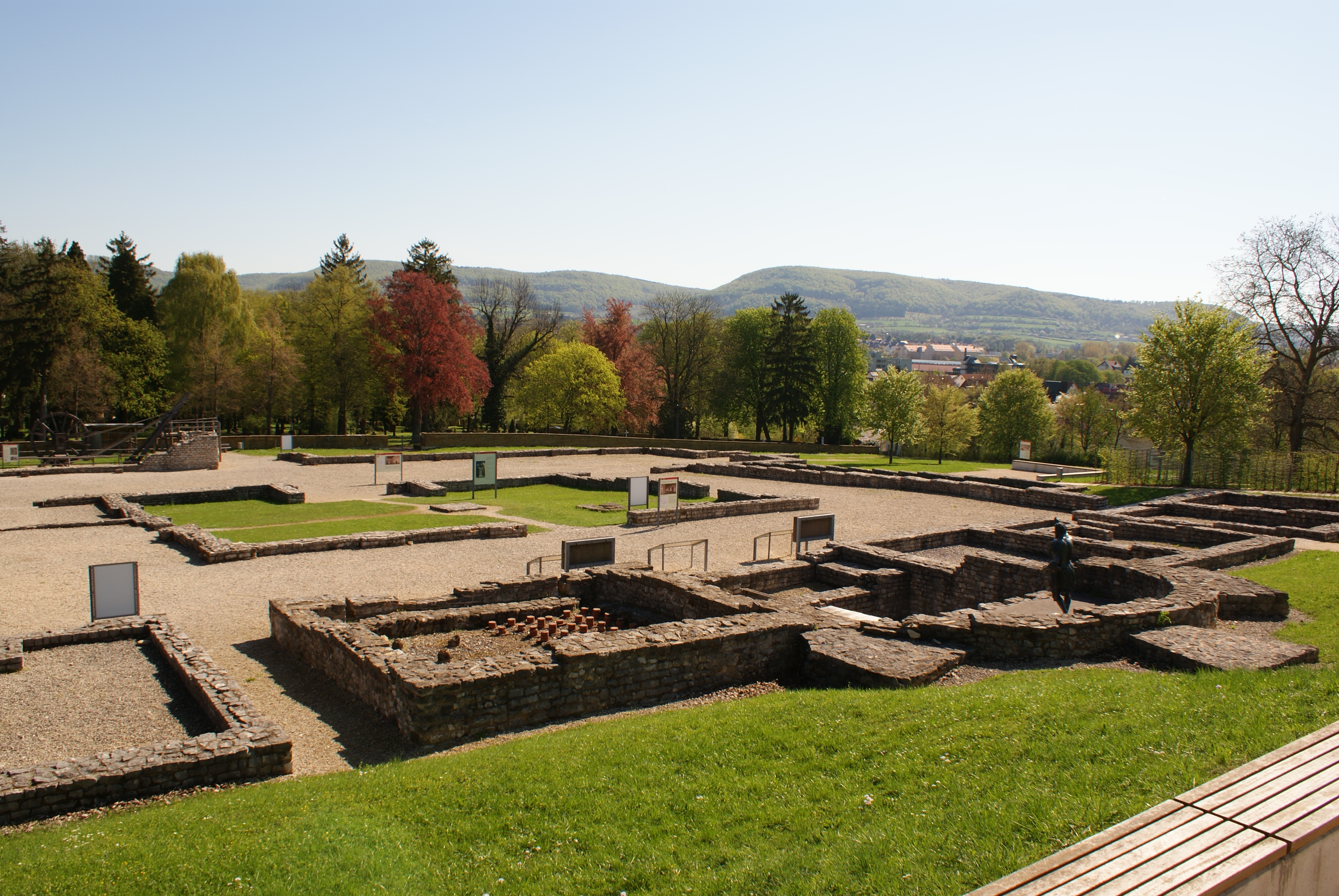 Ansicht der Außenanlage des Limesmuseums Aalen, rekonstruierte Grundmauern der principia des Reiterkastells.